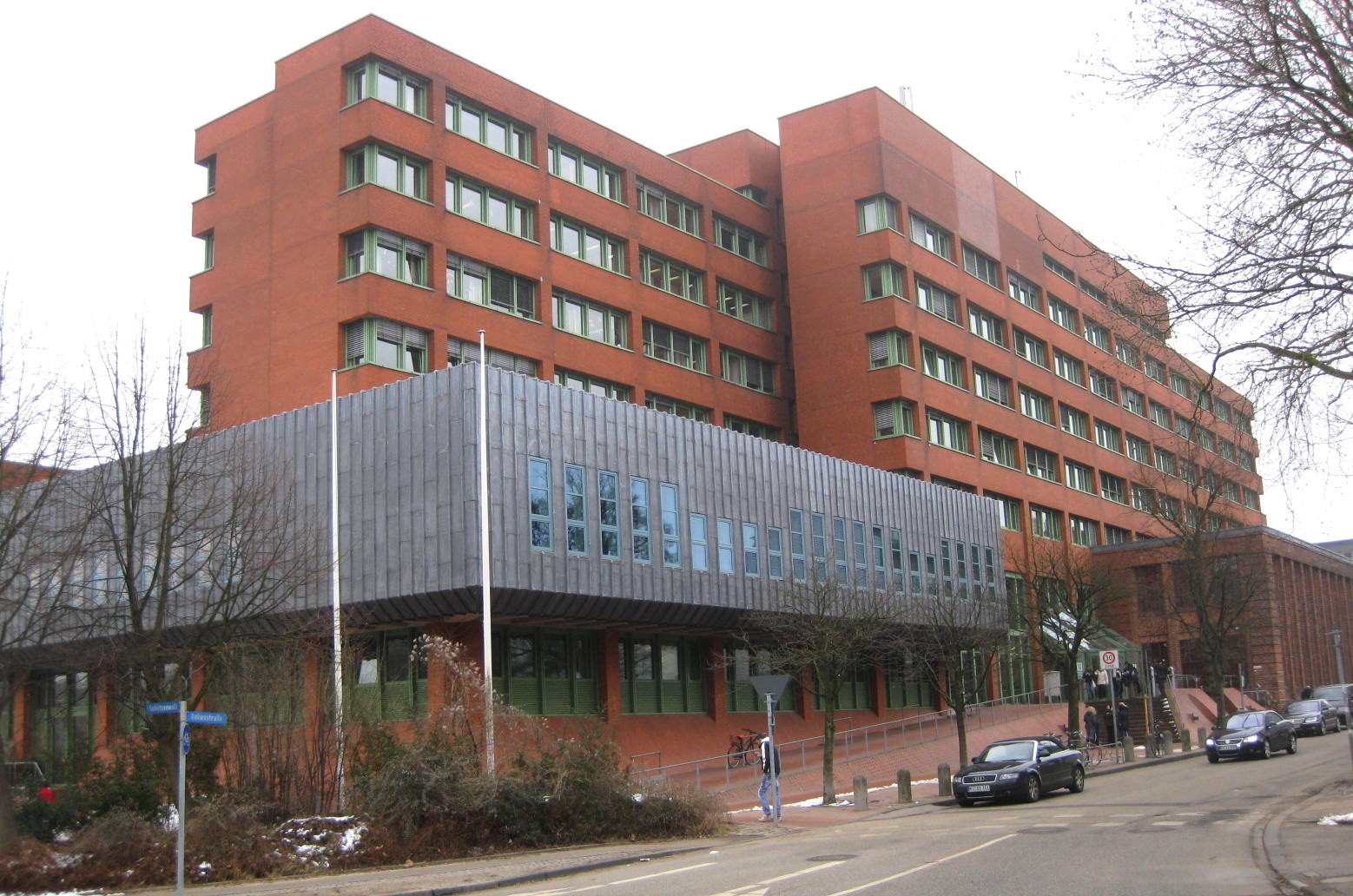 Gerichtshaus in Kiel, Schleswig-Holstein, Sitz des Amtsgericht Kiel, Arbeitsgericht Kiel, Landesarbeitsgericht Schleswig-Holstein